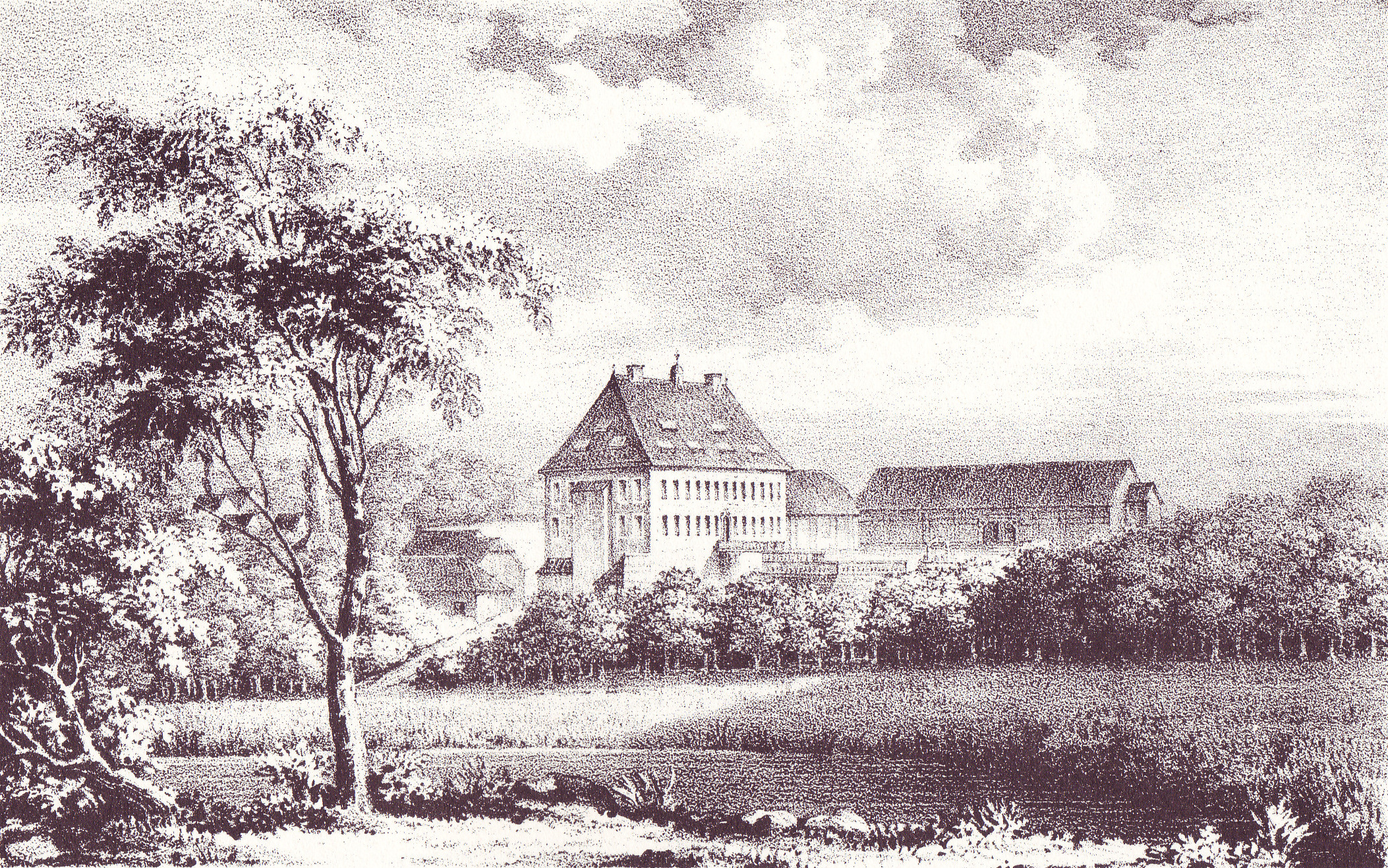 Lithografie mit der Abbildung des Schlosses Wewer